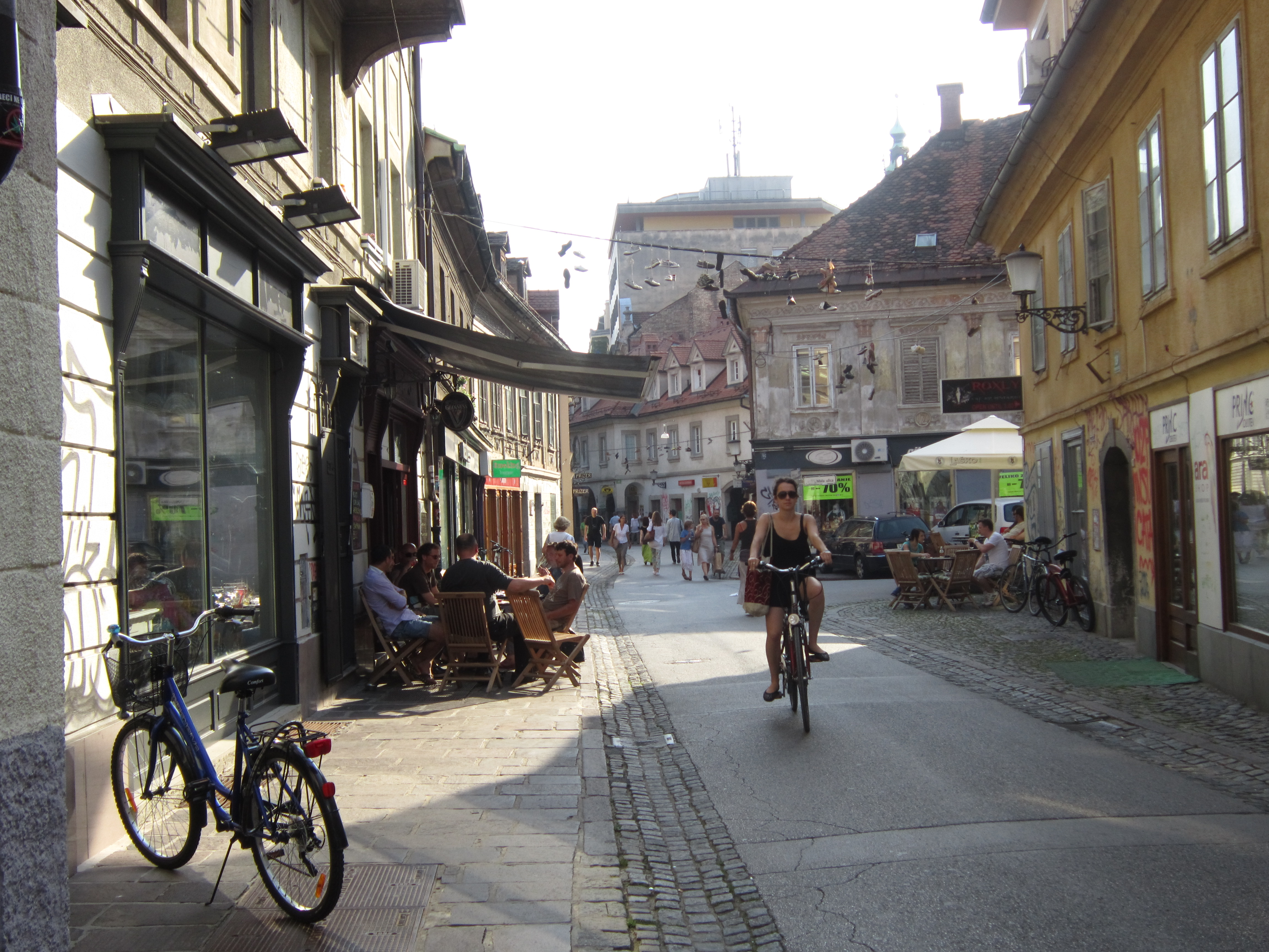 Ljubljana street